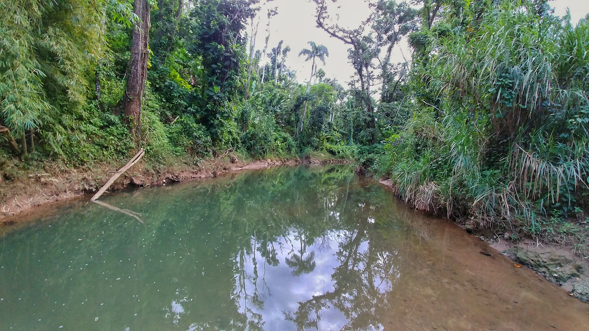 Río Guajataca, San Sebastián, Puerto Rico (2018)